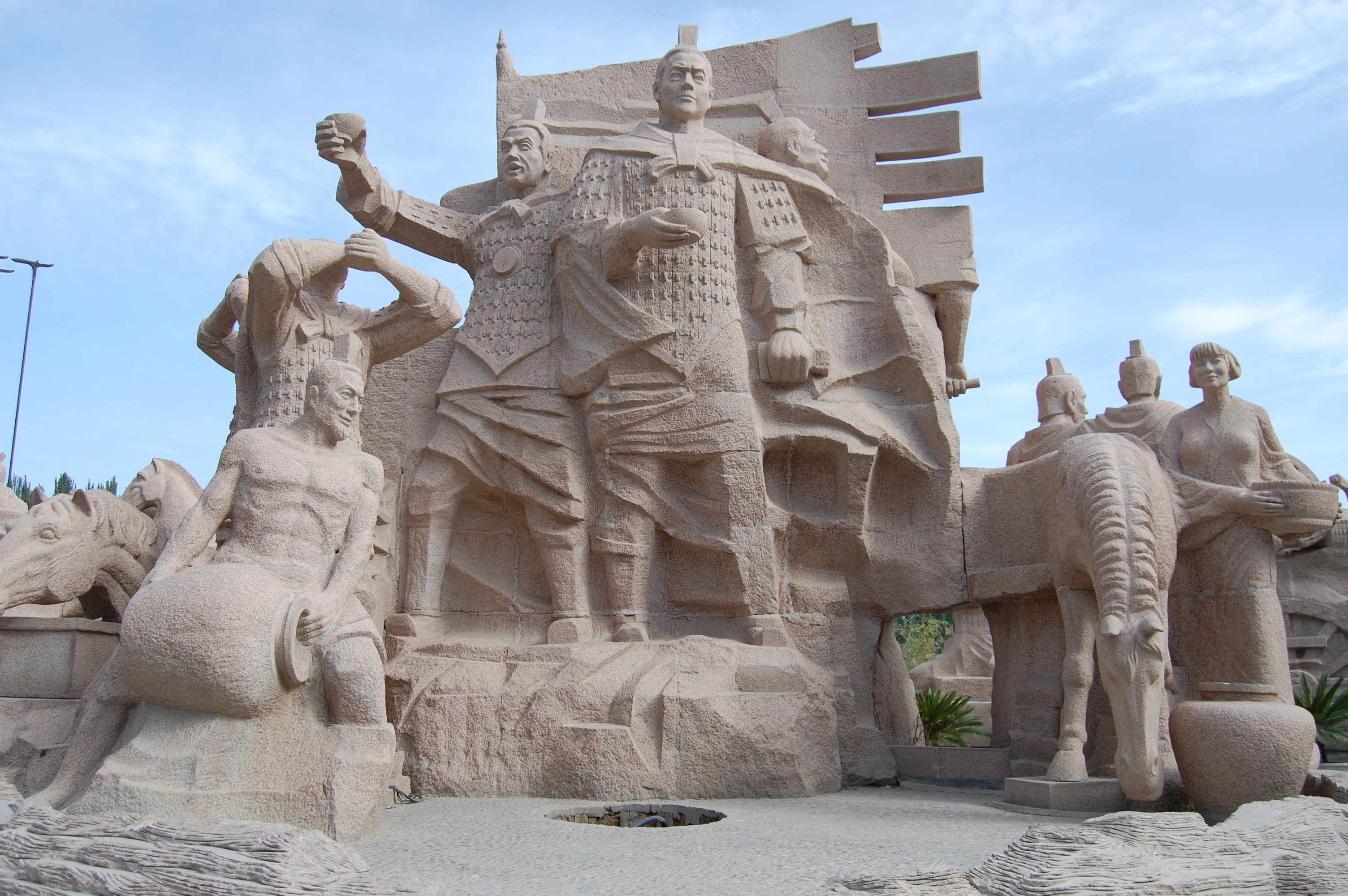 Relief in Jiuquan: General Huo Qubing (Mitte) lässt ein Fass Wein in die Quelle schütten (links)